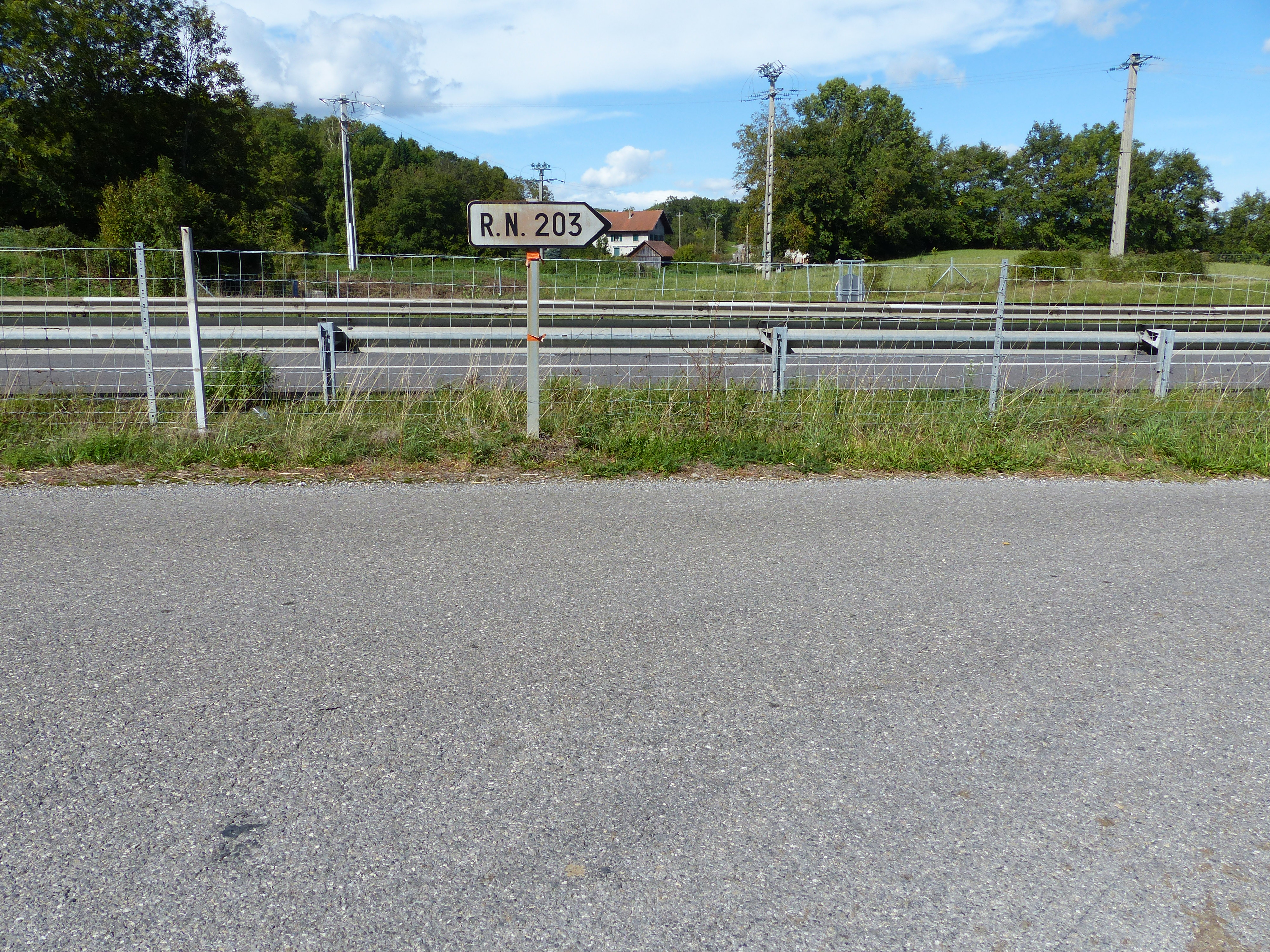 Panneau D21b direction R.N. 203, route de la Fornasse, Cornier, Haute-Savoie, France.